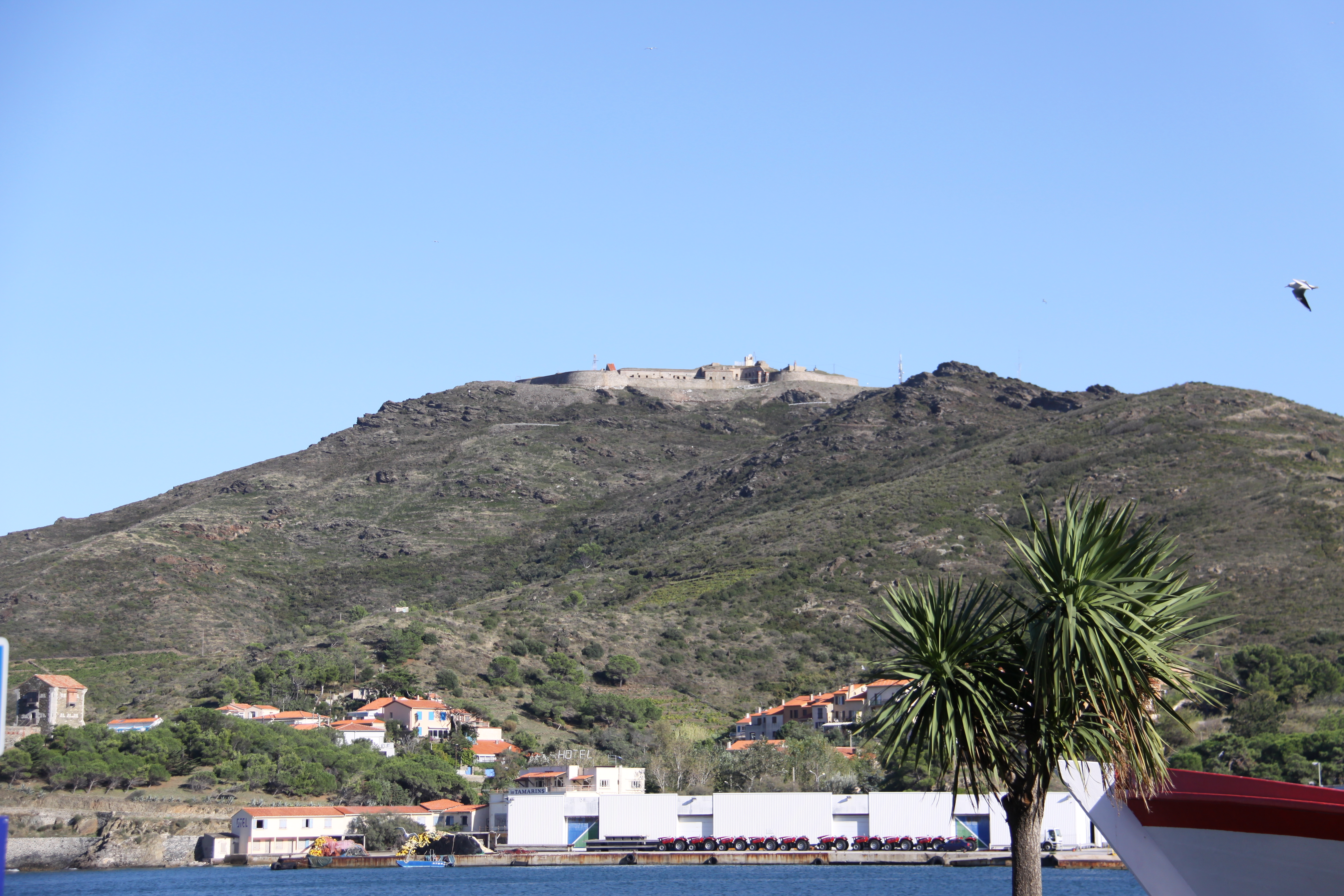 Le fort Béar, ouvrage militaire du 19e siècle, vue depuis le port de Port-Vendres, Pyrénées-Orientales, France.